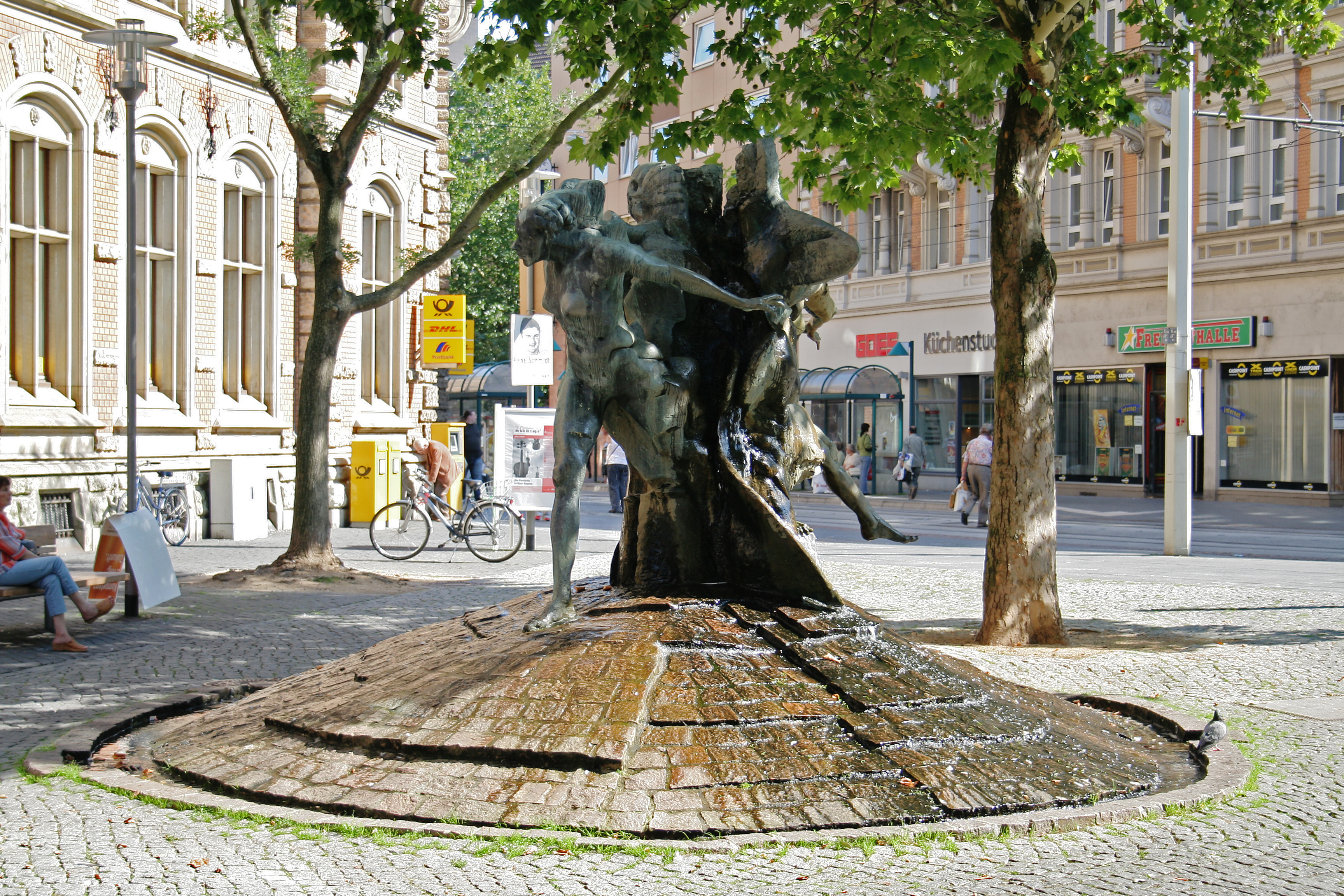 Brunnen "Befreiung des Menschen aus starren Bindungen und Normen" in der Friedrich-Wilhelm-Straße, Braunschweig